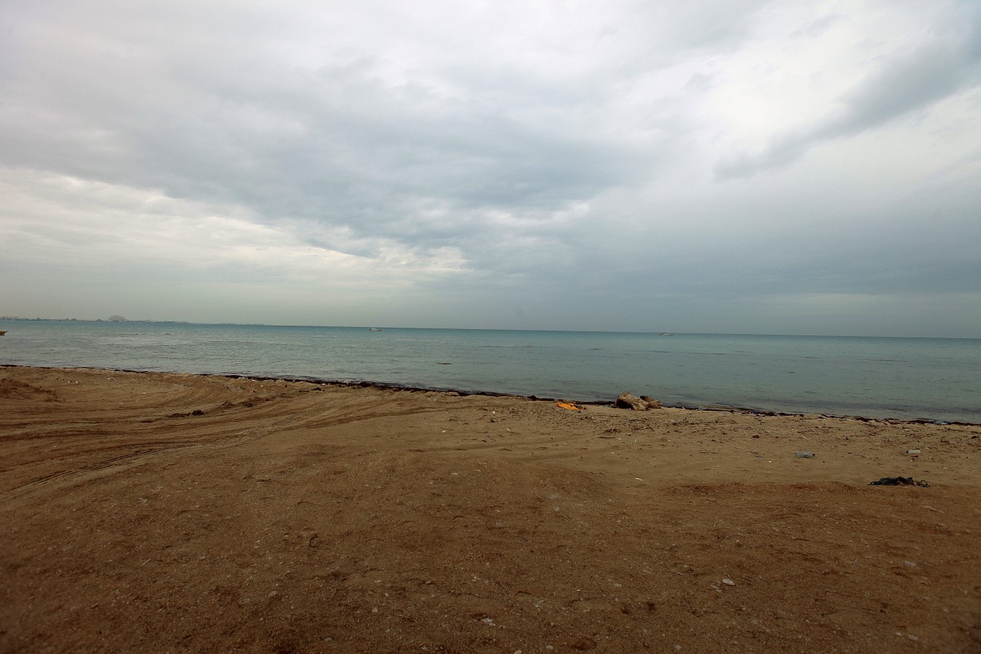 Ruwais Beach